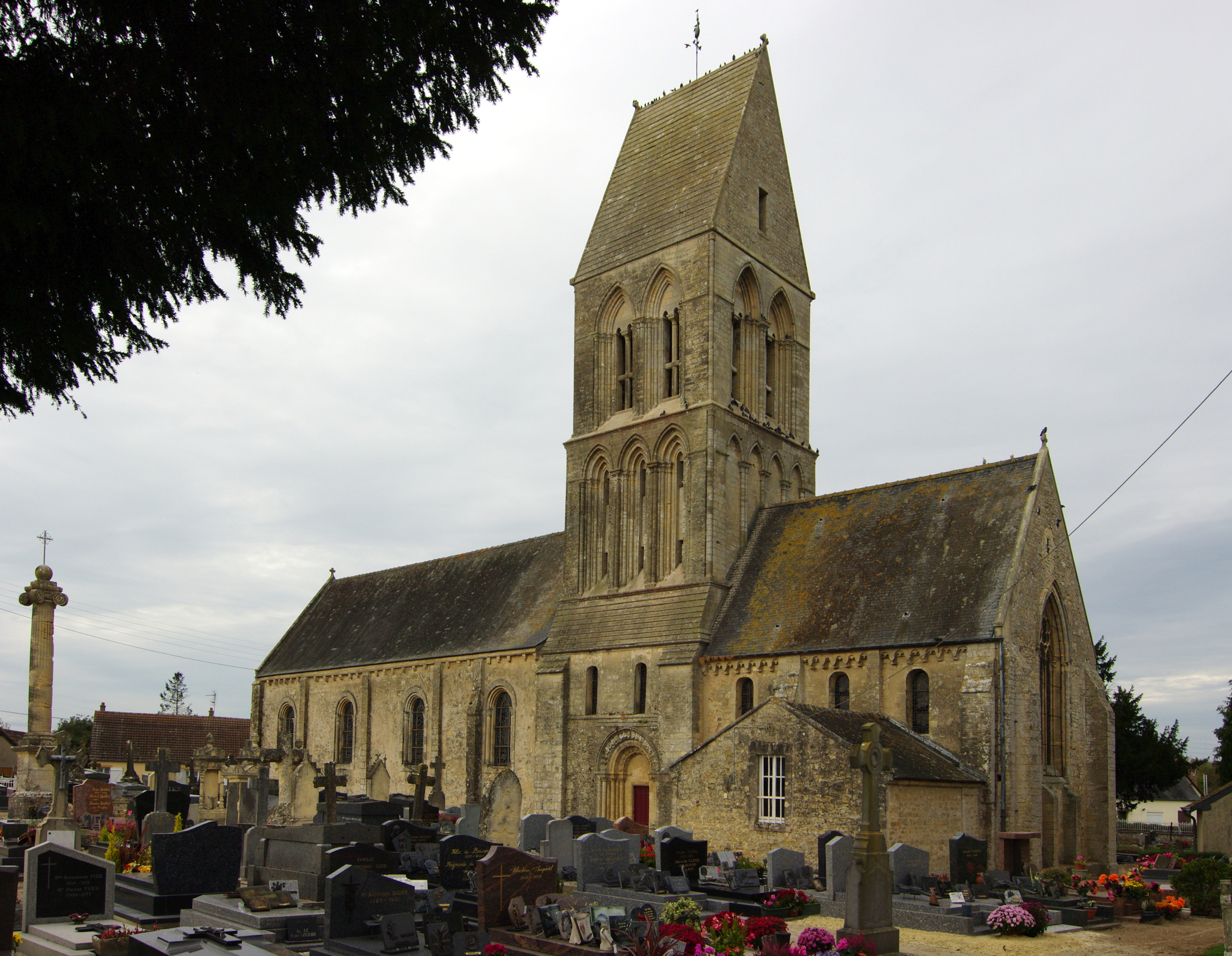 L'église Saint-Martin à Formigny, Calvados.